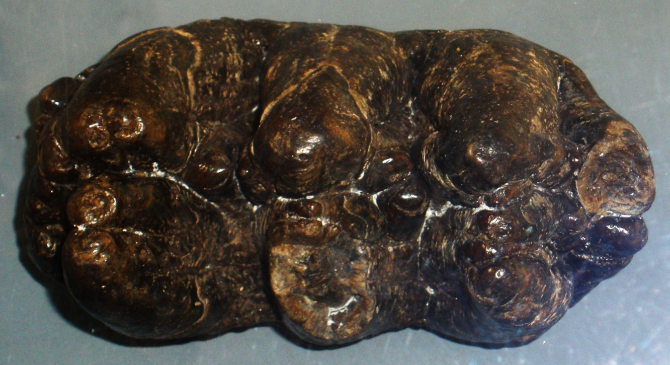 Fossil of Cuvieronius, an extinct mammal -- Took the photo at Natural History Museum, London